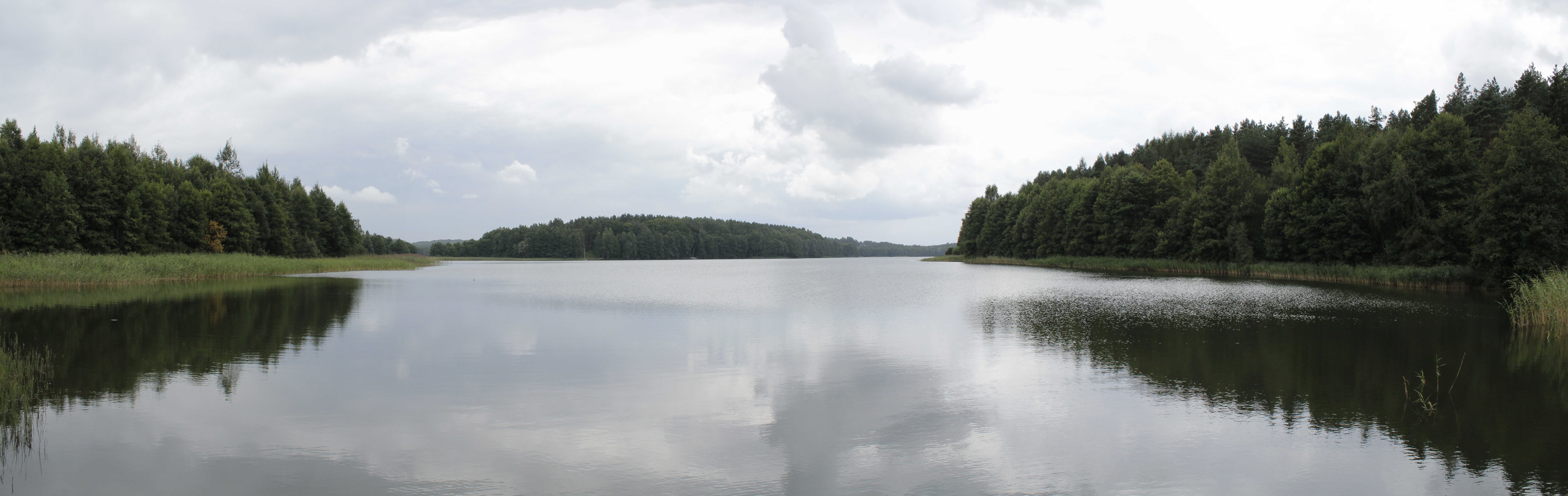 Wykonane aparatem Canon EOS 600D, złączone za pomocą programu ArcSoft Panorama Maker. Zdjęcie wykonane pod koniec sierpnia 2013.